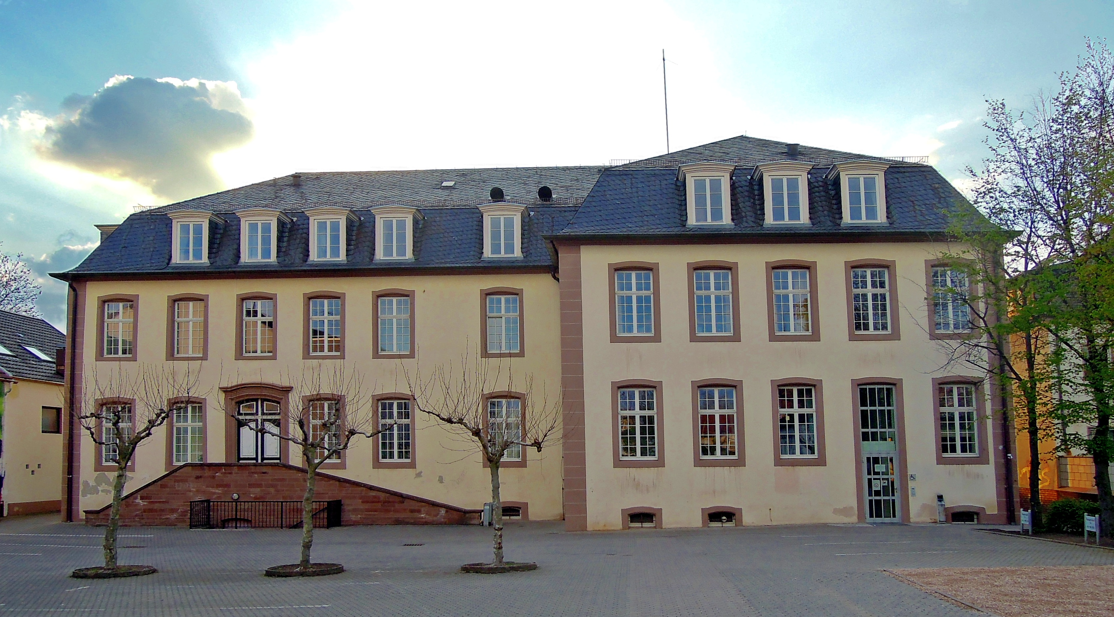 Schlossplatz, Schloss Saarwellingen, 1766 (Einzeldenkmal)